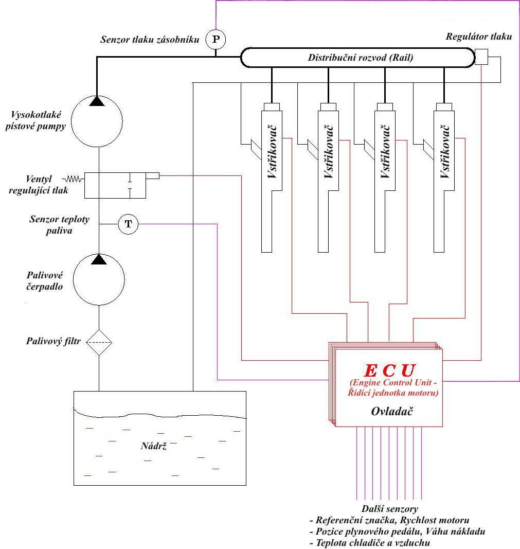 Česky: Diagram přímého vstřikování Common rail pro dieselové motory.